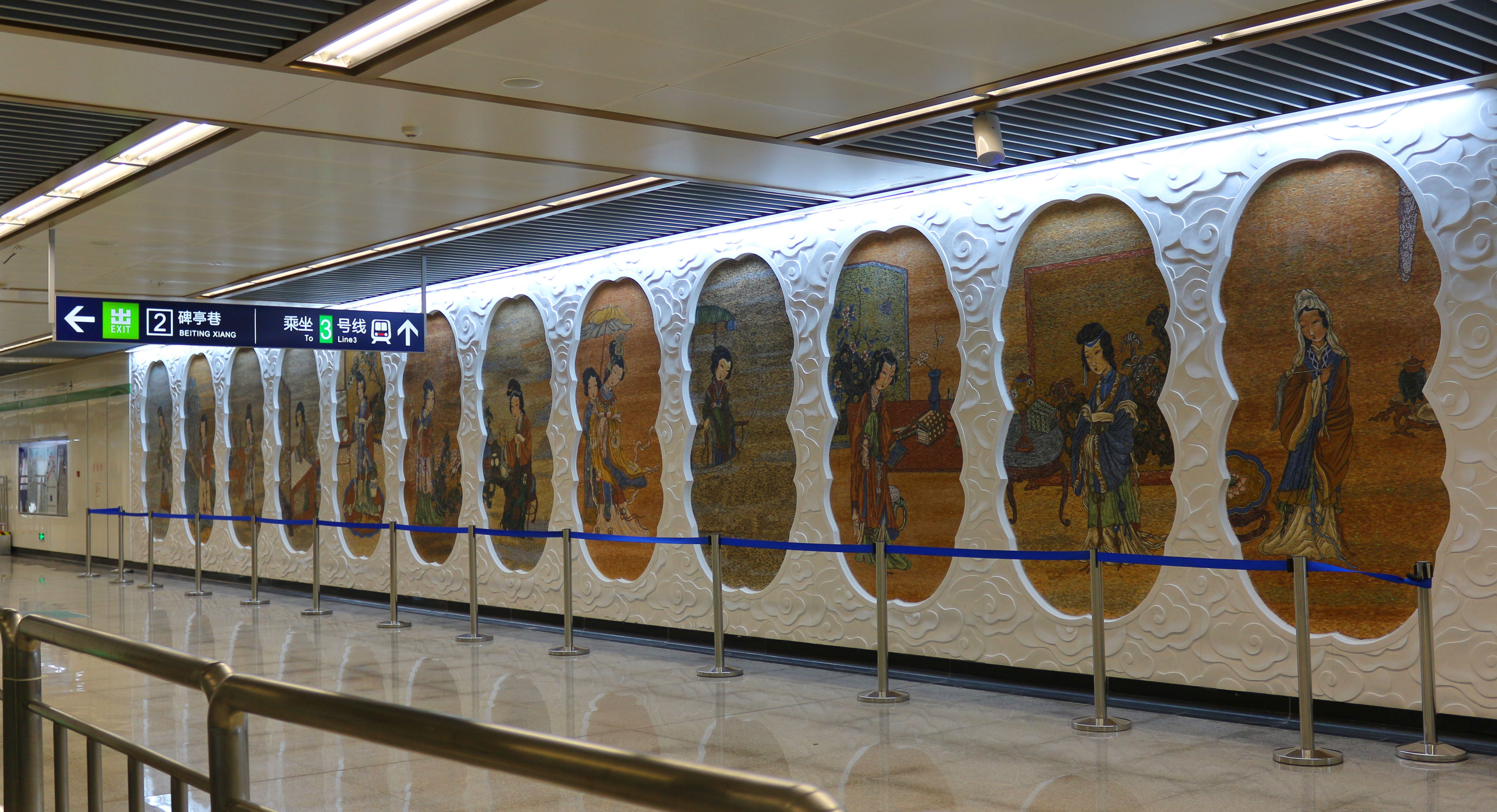 南京地铁3号线位于大行宫站换乘通道的金陵十二钗图